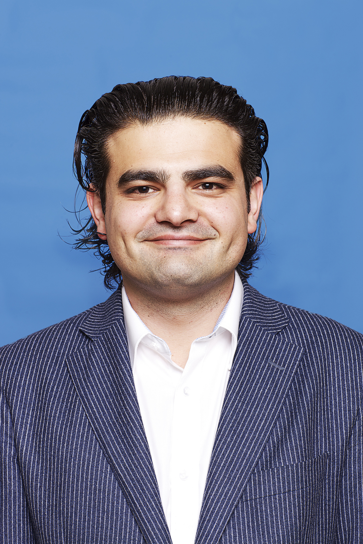 Tunahan Kuzu, Kandidaat-Kamerlid. Foto: Lex Draijer.